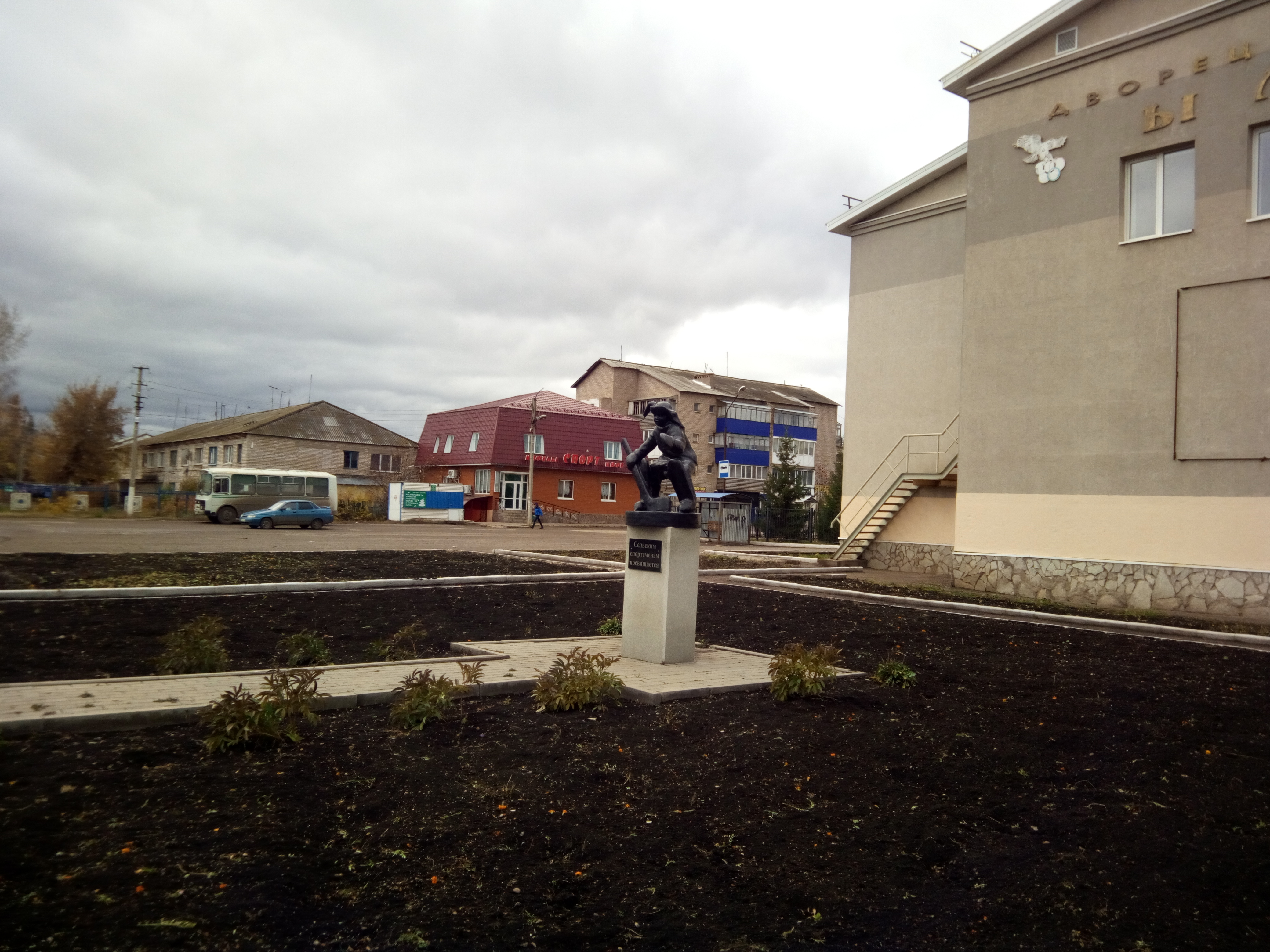 Ра́евский — село 16 ноября 1938 года до 2005 г. посёлок городского типа) в Республике Башкортостан России, административный центр Альшеевского района и Раевского сельсовета.